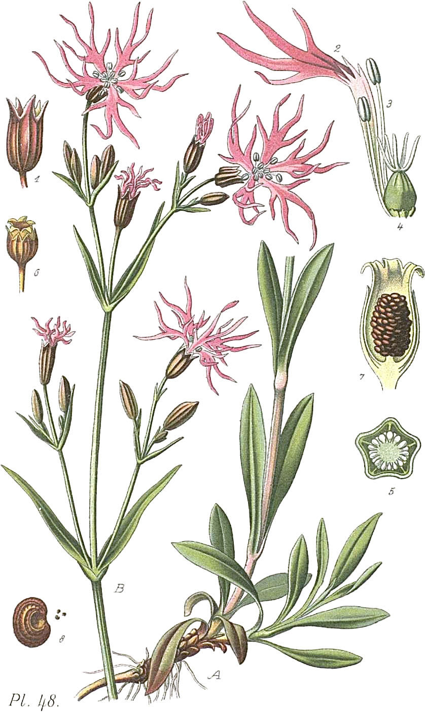 Silene flos-cuculi (L.) Greuter & Burdet described as Lychnis flos-cuculi L.